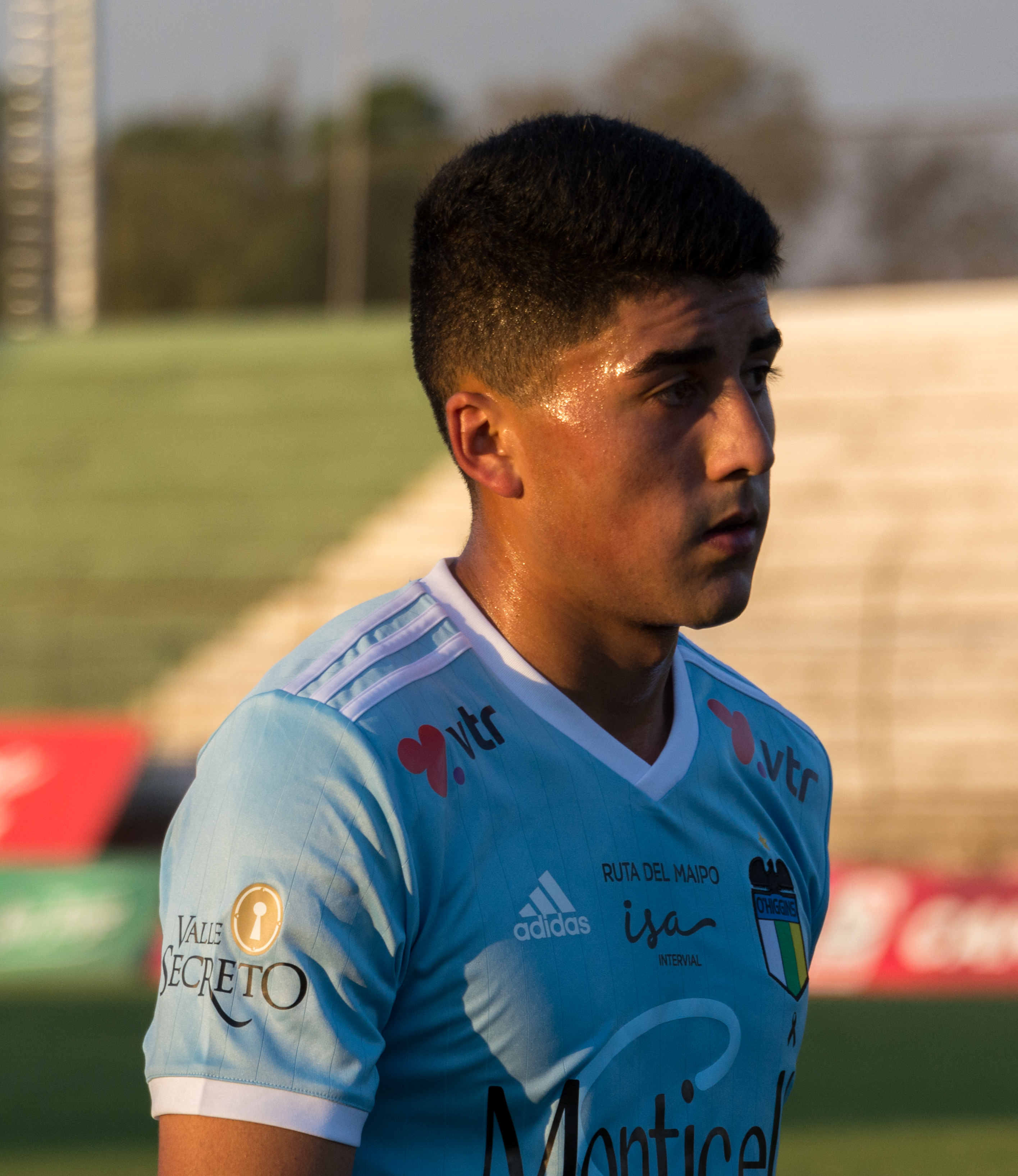 Lucas Fierro, Palestino v O'Higgins, Estadio Municipal de La Cisterna, La Cisterna, Santiago, Chile.